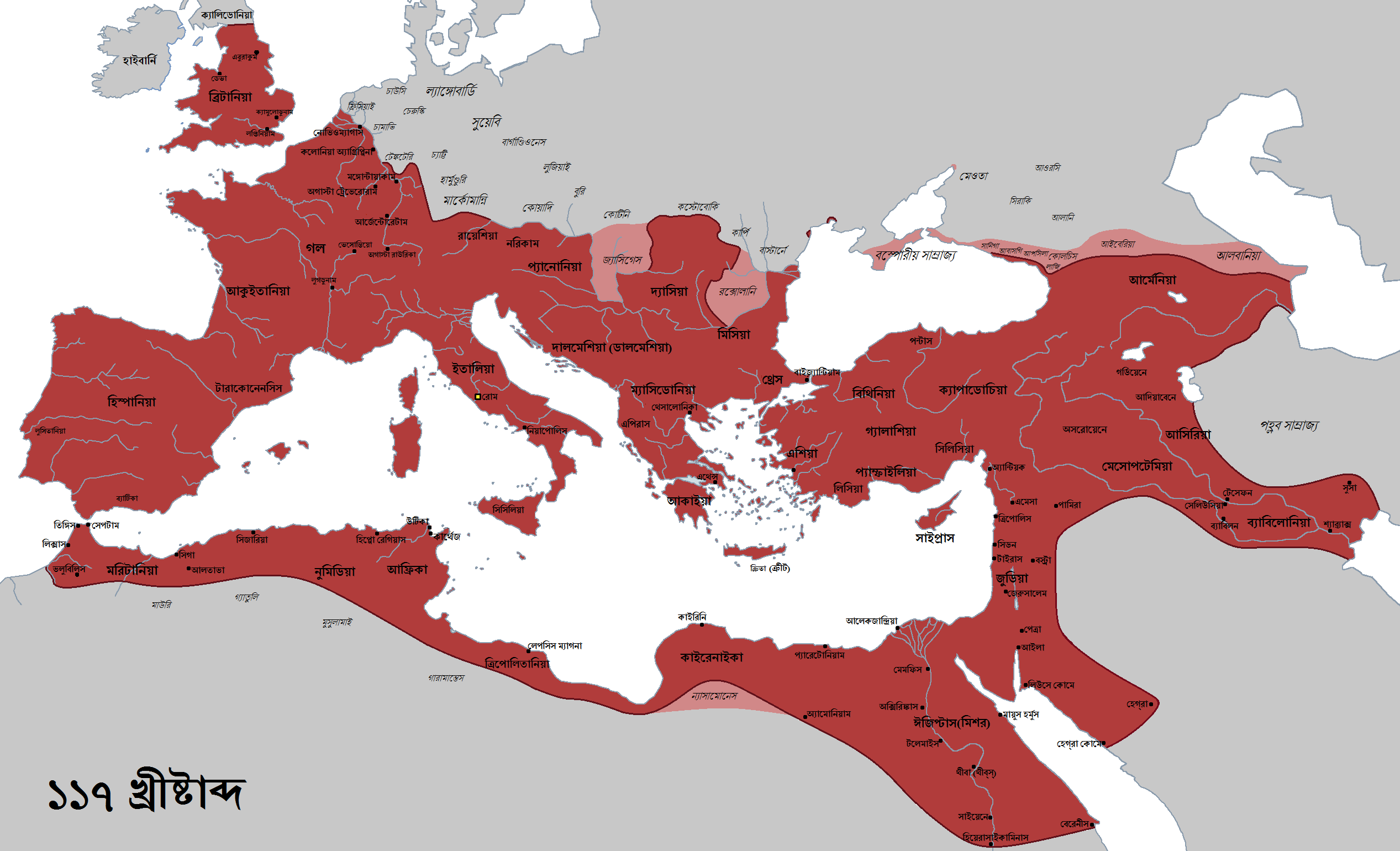 সম্রাট ট্রাইয়ানের রাজত্বকালে রোমান সাম্রাজ্য সর্বাধিক বিস্তৃতি লাভ করে। ১১৭ খ্রীষ্টাব্দে ট্রাইয়ানের অধীনে এই সাম্রাজ্যের আনুমানিক বিস্তারের মানচিত্র এটি। লাল অংশ রোমান সাম্রাজ্যের অন্তর্ভুক্ত।